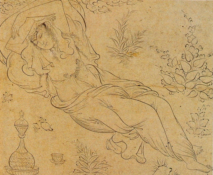 Riza-yi-Abbasi. Спящая женщина. Казвин. 1595 муз. Саклера